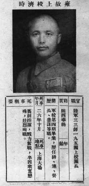 抗戰軍人忠烈錄第一輯中的烈士遺像